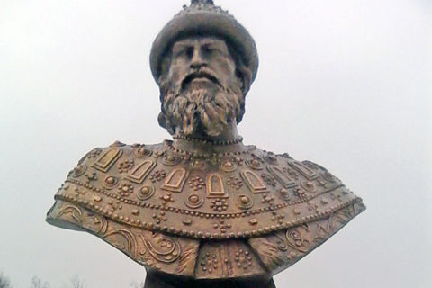 Бюст Ивана Грозного (скульптор А. А. Аполлонов) в селе Ирково Александровского района (Владимирская область)